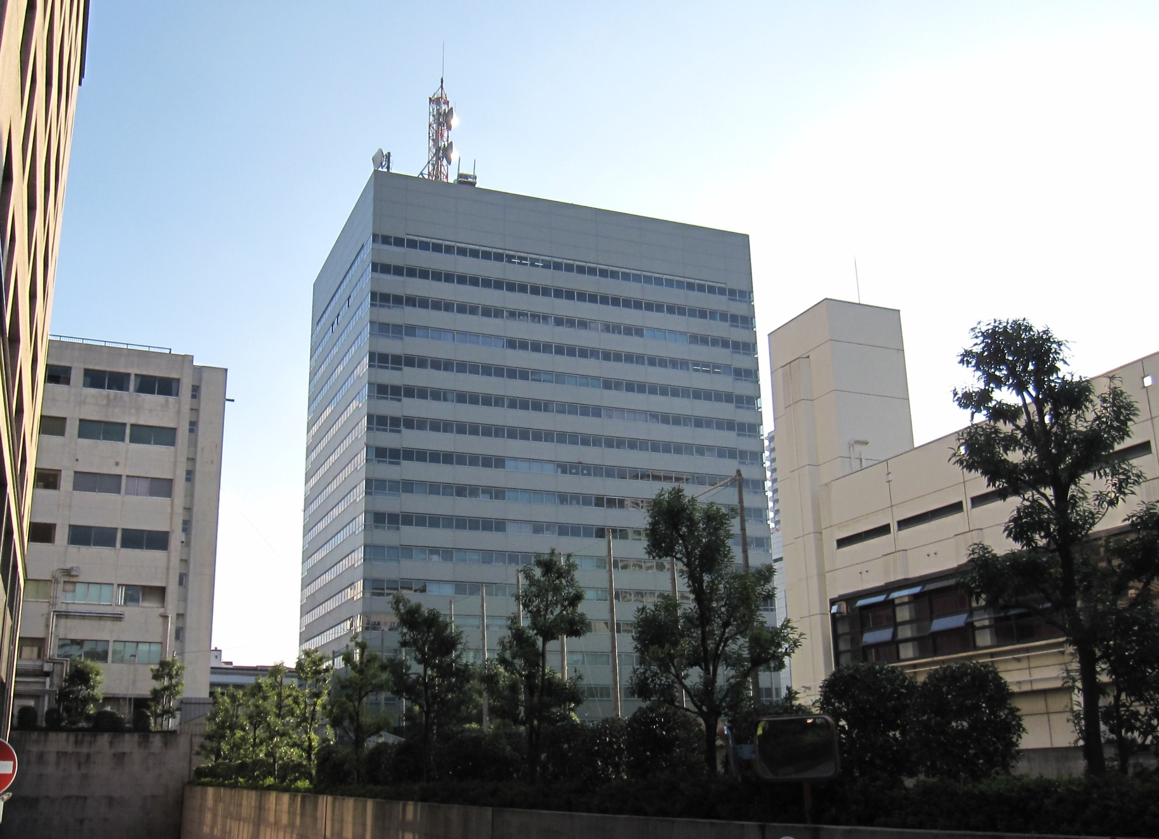 大阪合同庁舎第4号館（入居官署一覧）